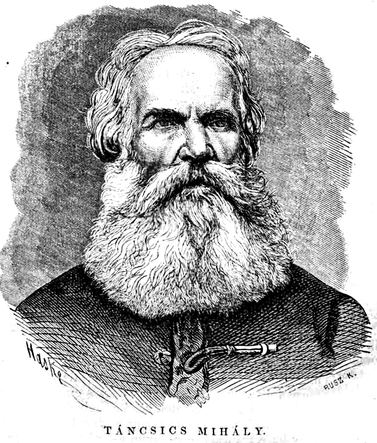 Táncsics Mihály (1799–1884) író, politikus. Rusz Károly metszete. (Vasárnapi Ujság, 1868. március 15.)